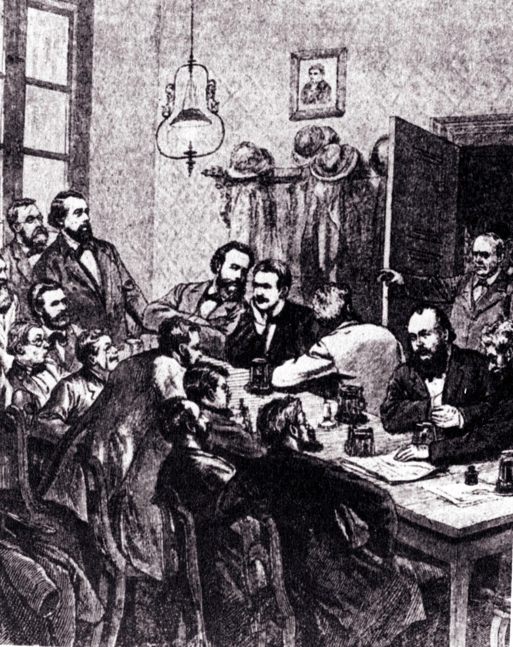 Auflösung einer sozialdemokratischen Versammlung während des Sozialistengesetzes 1881 in Leipzig. Unter anderen abgebildet: Wilhelm Liebknecht (stehend, 2. von links), August Bebel (vor Liebknecht sitzend), Wilhelm Hasenclever (am Tisch sitzend, 2. von rechts).Zeitgenössische Darstellung 1881